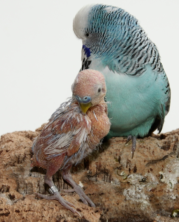 Wellensittich mit den Symptomen, die bei PBFD oder Polyomaviren bekannt sind. Die Vermutungen zur Art der Erkrankung beim unbefiederten Sittich konnte in Untersuchungen nicht bestätigt werden, das Erscheinungsbild entspricht aber den genannten Krankheitsbildern. Das unbefiederte Tier war zum Zeitpunkt der Aufnahme ca. 5 Jahre alt, der normal befiederte Wellensittich ca. 12 Jahre. Die gezeigten Wellensittiche pflegen eine sehr enge Partnerschaft.